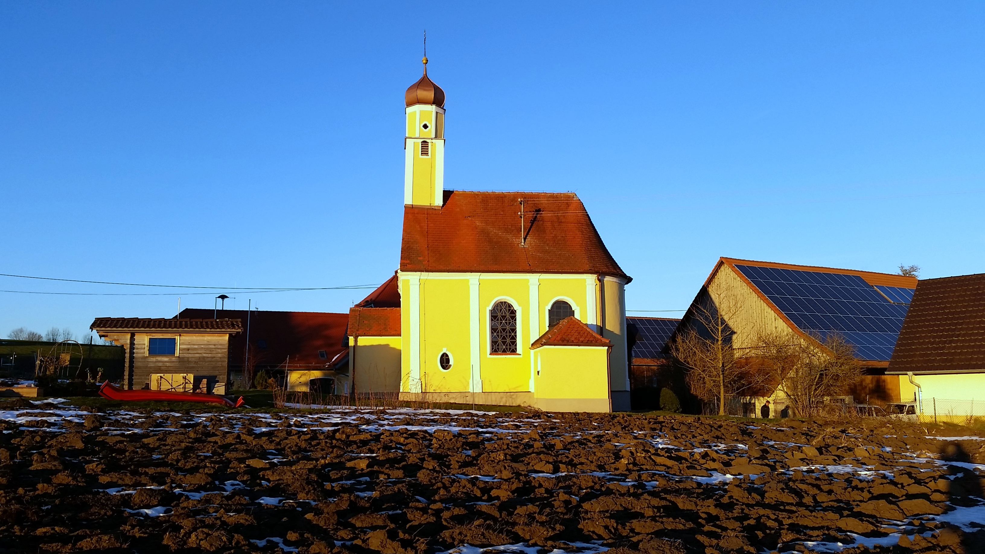 St. Wendelin, Traunried, Gemeinde Ettringen (Wertach)